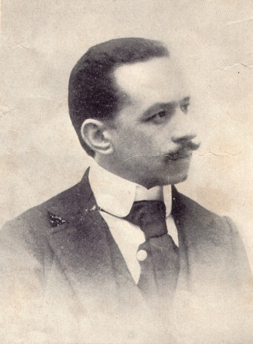 Da Maria Luisa Alasia Foto di mio gran-zio Cristoforo Alasia. Da inserire